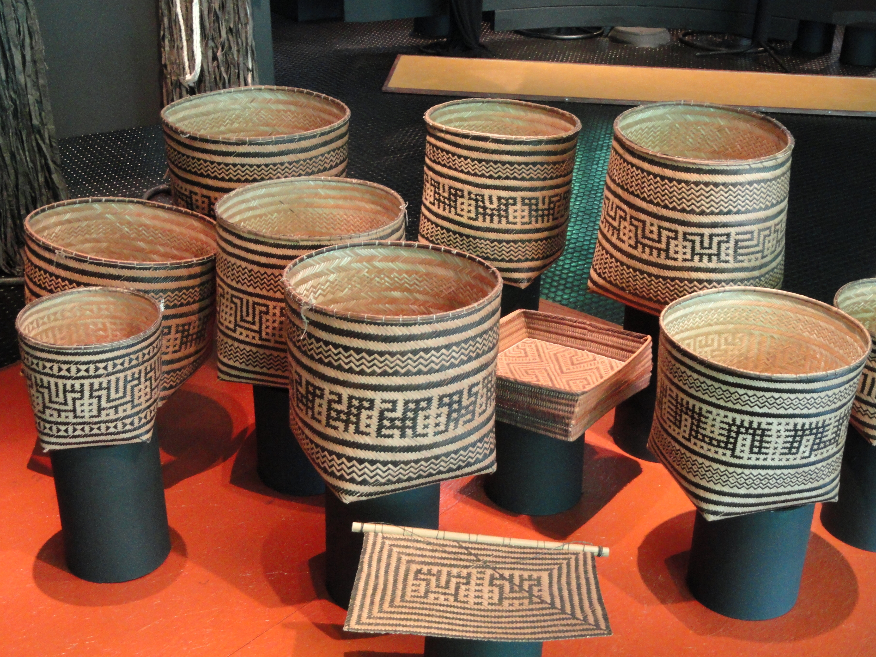 Exhibit in the Memorial dos Povos Indígenas, Brasília, Brazil.